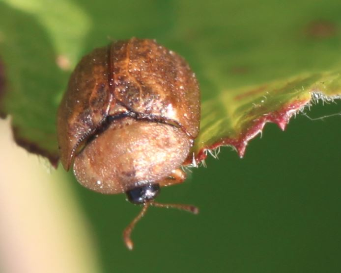 Schildkäfer Hypocassida subferruginea am 26. Juli 2019 in Walldorf/Baden